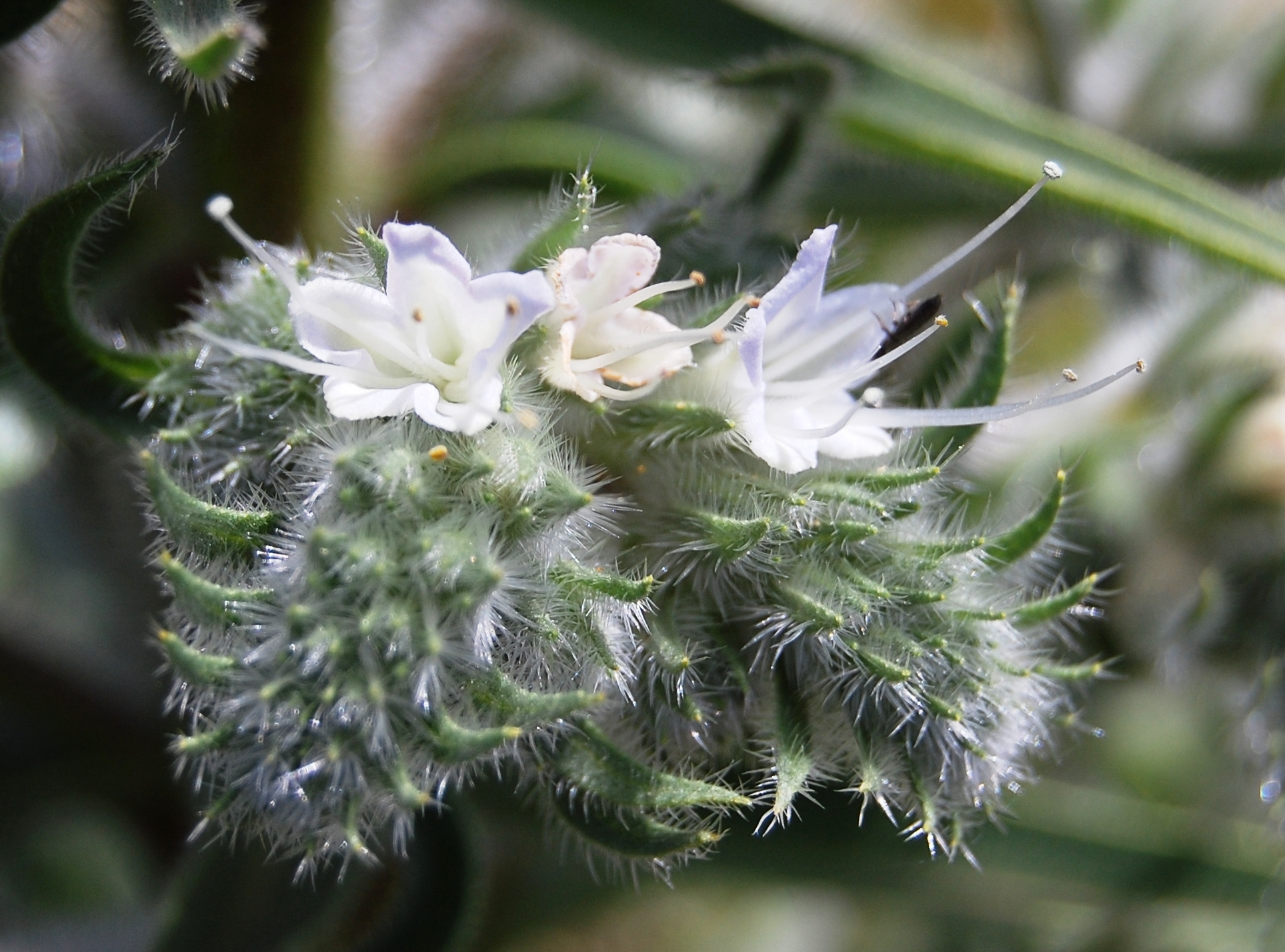 Echium italicum subsp. siculum Riserva naturale Monte Pellegrino, Palermo